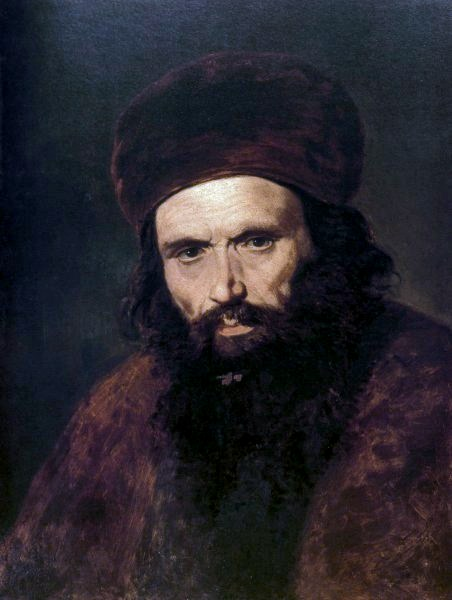 Zaremba